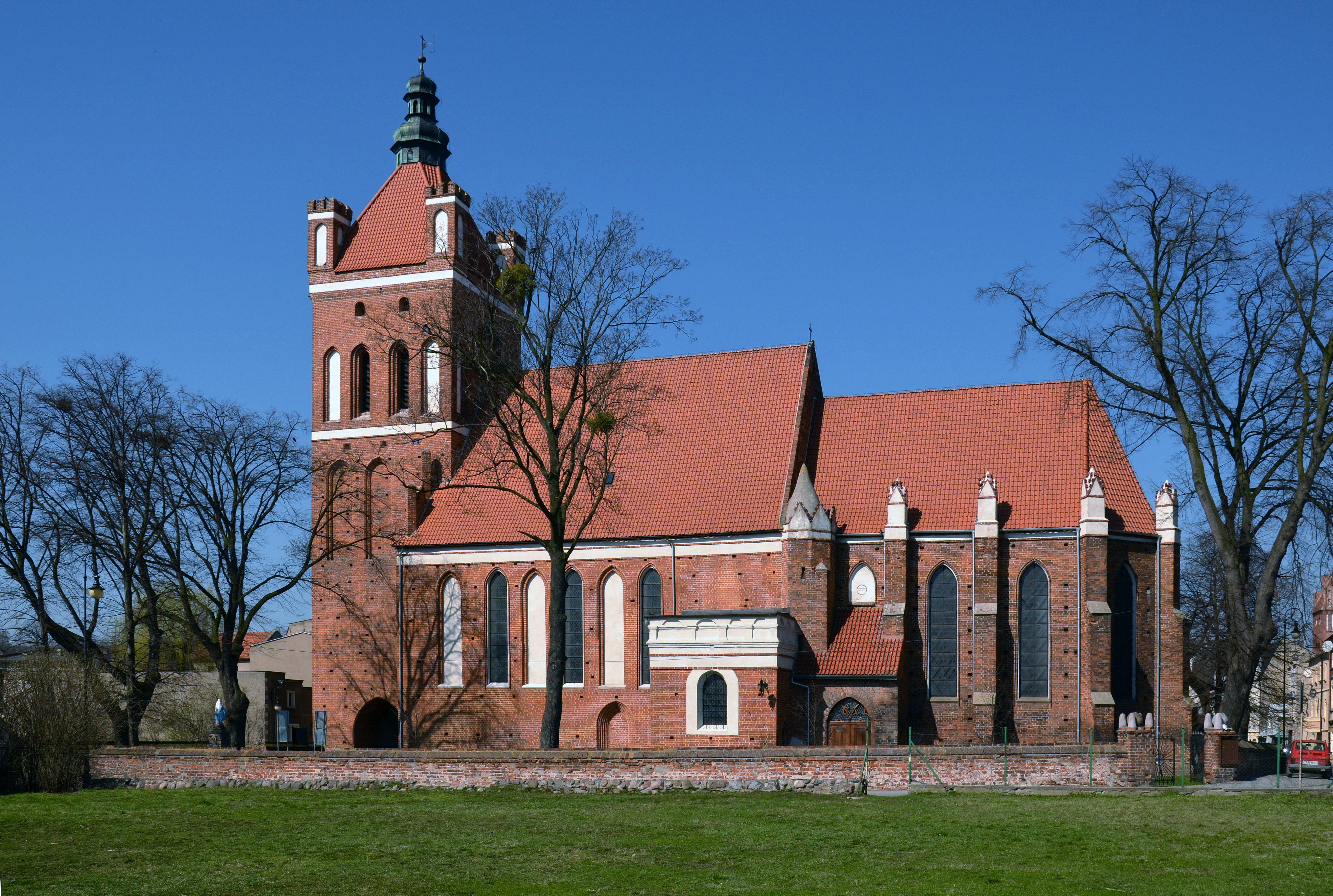 kościół par. pw. św. Katarzyny, w Golubiu, XIII-XIV w. Golub-Dobrzyń, ul. Kościelna 13